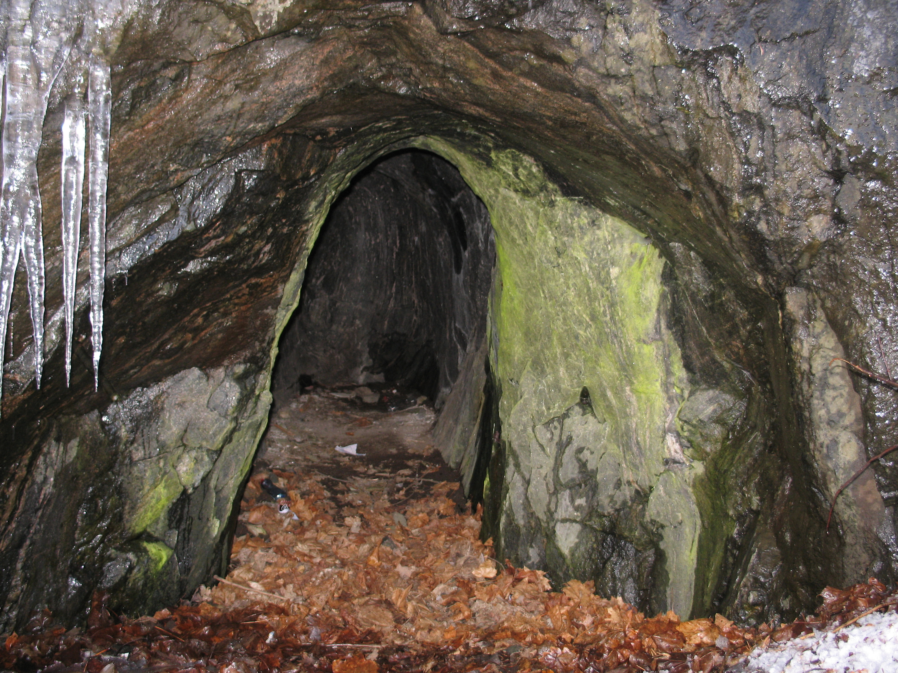 Påbegynt stoll ved Torbjørnbu gruve. Laget med fyrsetting, arbeidet er avbrutt etter ca 5 meter. Trolig fra gruvens første tid.